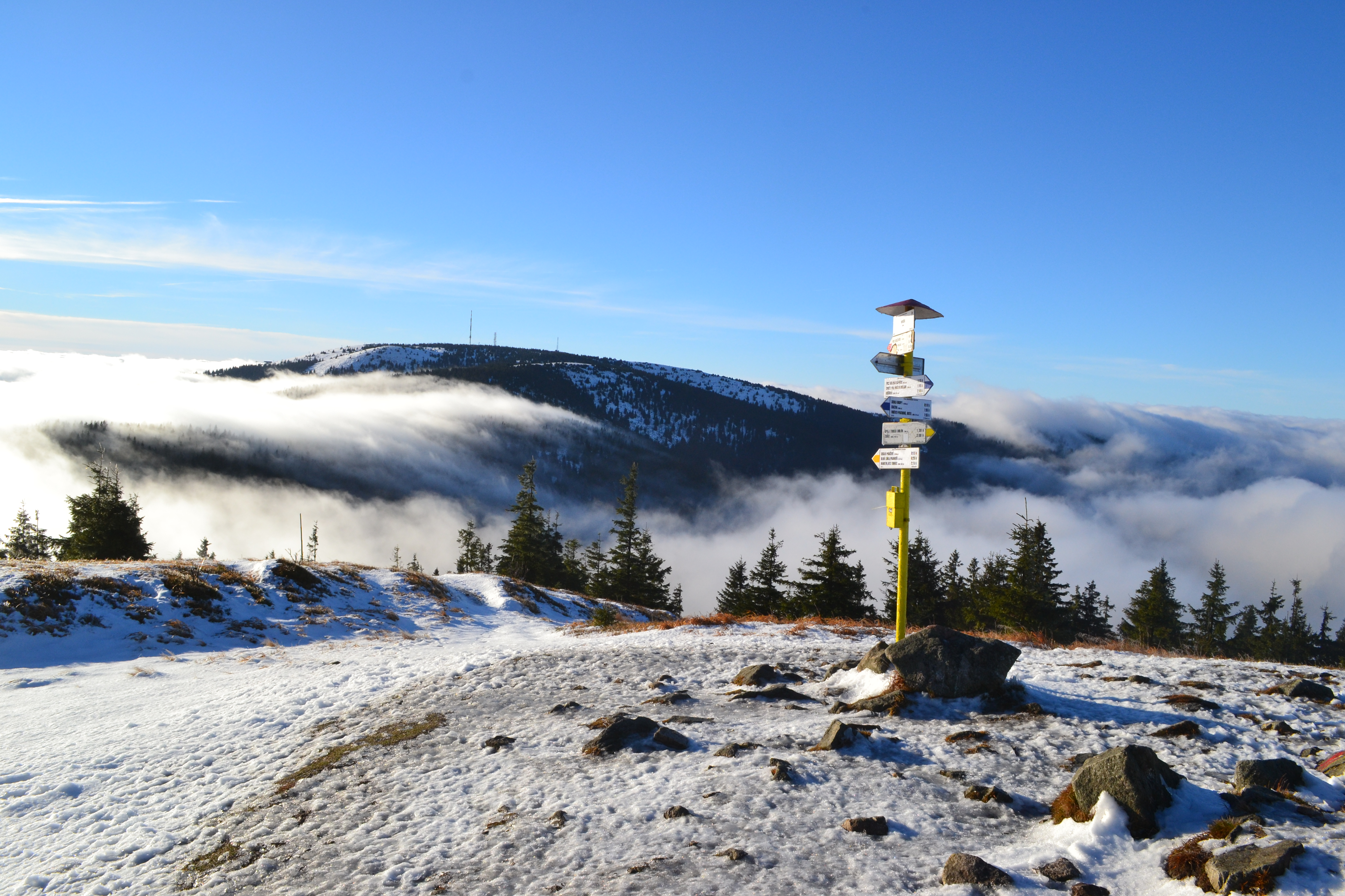 Vrchol Minčola a Martinské hole